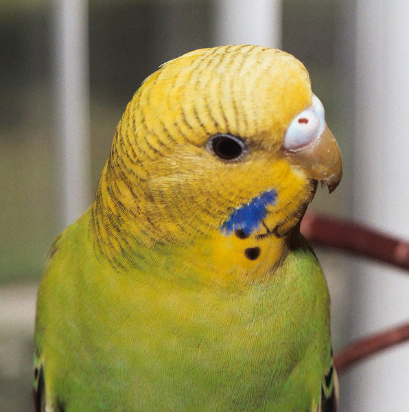 De es::en:Image:Dixie Bell close.JPG Perico australiano y su plumaje algunas meses después de haber nacido